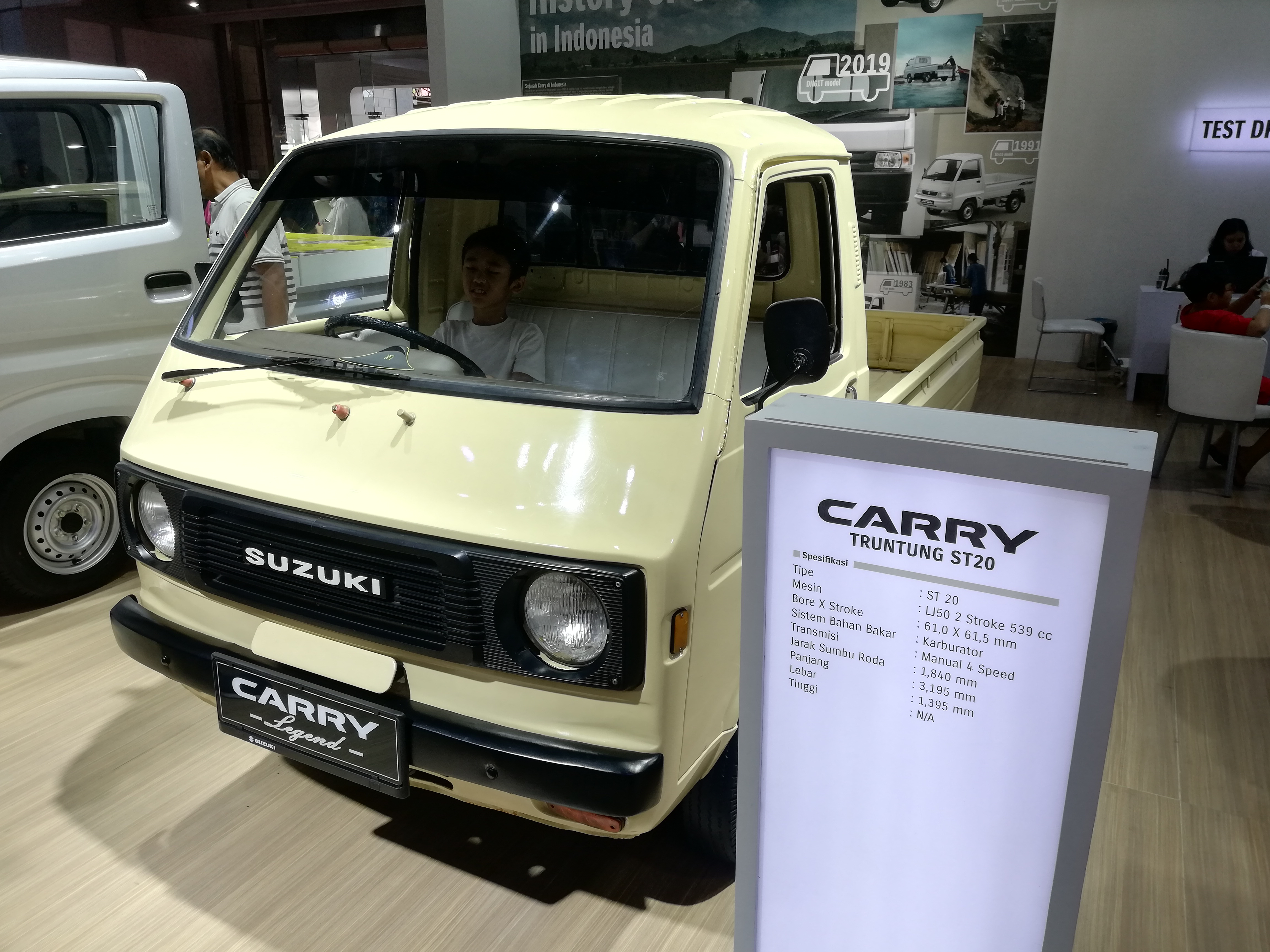 Mobil Suzuki Carry Klasik